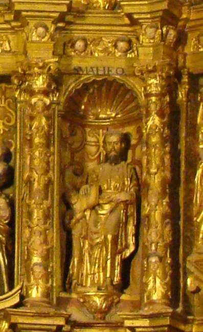 Imagen de San Mateo en la Parroquia de Santa Ana de Fregenal de la Sierra